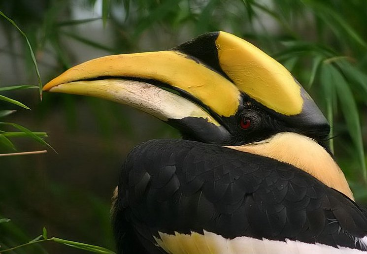 Beschreibung, Quelle und Lizenz Aufgenommen mit einer Canon EOS 300D im Kölner Zoo, Tropenhaus. Fotograf/Quelle: Petra Karstedt / Motiv: Doppelhornvogel (Bucerus bicornis) Licensing 14:48, 26. Nov 2005 Wilfried Berns 786 x 526 (68054 Byte) (* Aufgenommen mit einer Canon EOS 300D im Kölner Zoo, Tropenhaus. * Fotograf/Quelle: Petra Karstedt / * Motiv: Doppelhornvogel (Bucerus bicornis) )